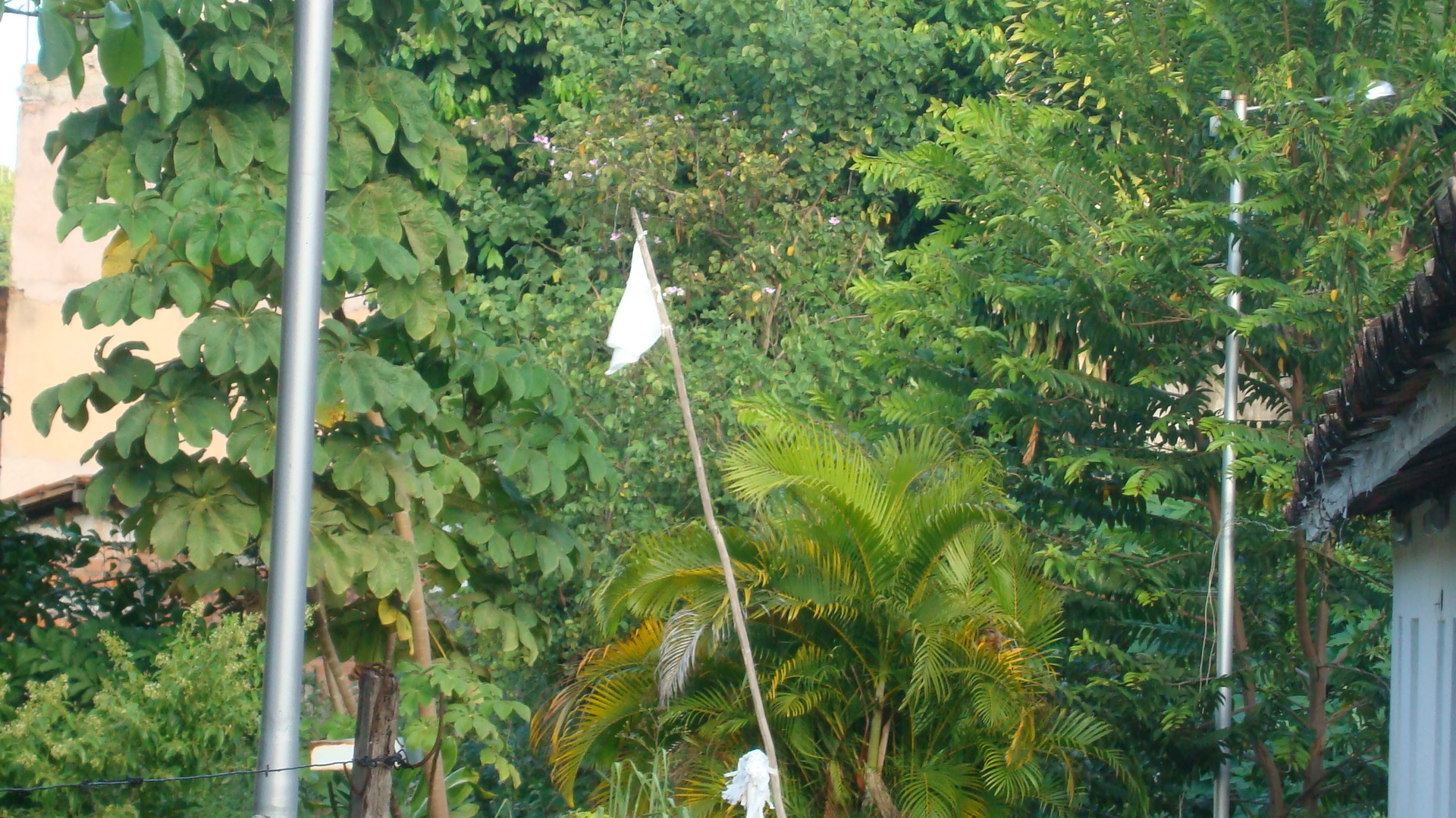 figura tal